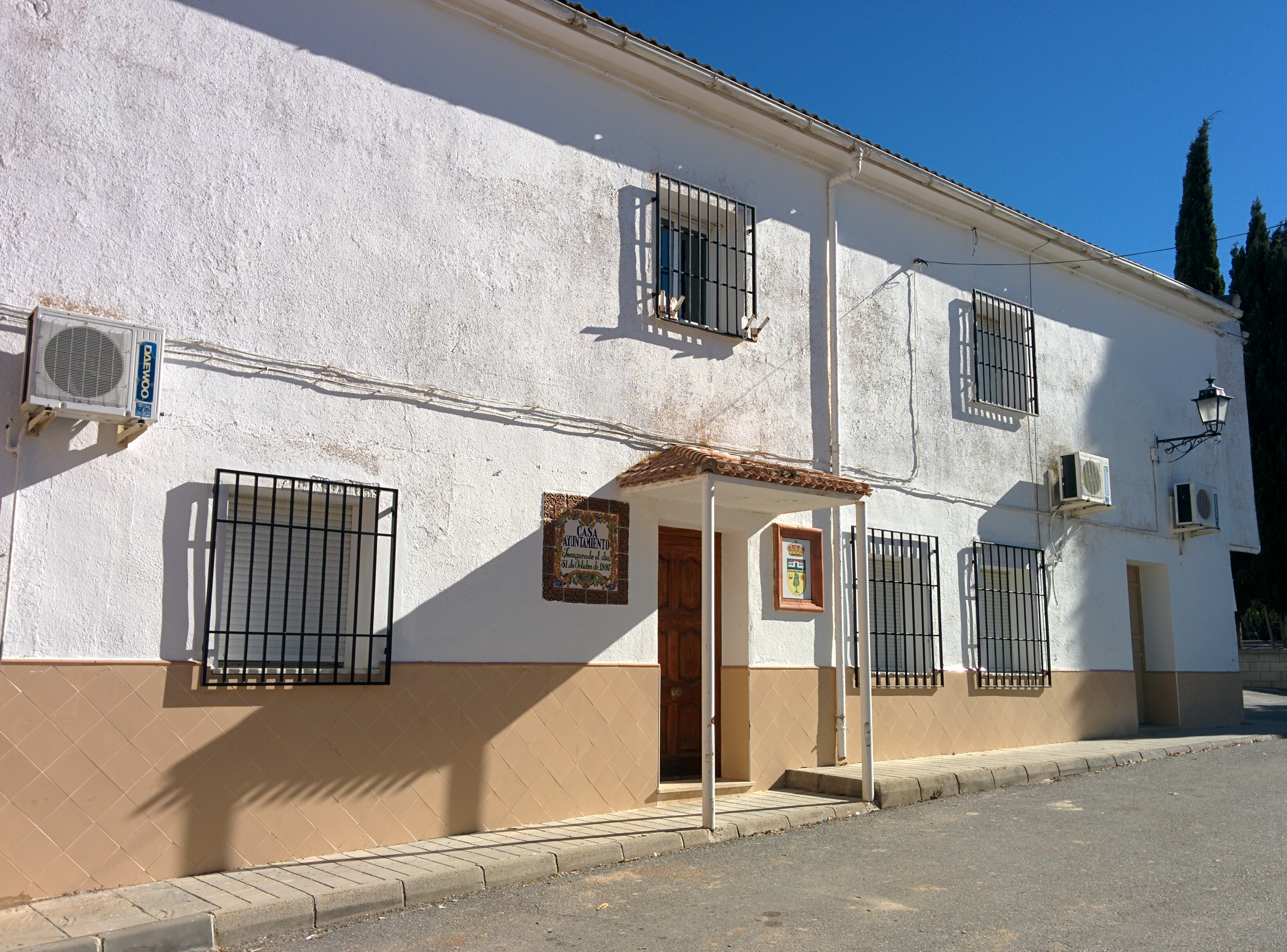 Antigua casa consistorial, Dehesas Viejas (Granada, España).